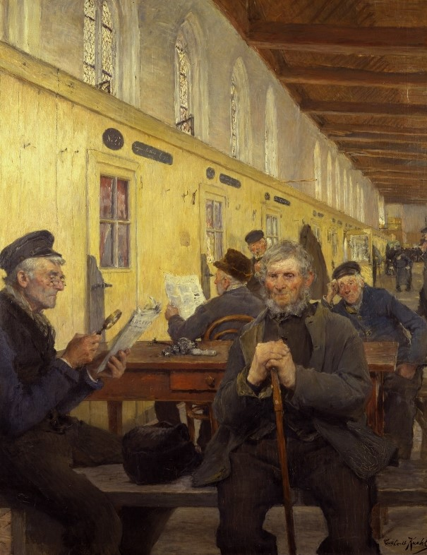 Altmännerhaus in Lübeck; Berlin, Staatliche Museen zu Berlin - Preußischer Kulturbesitz, Nationalgalerie, Inv.-Nr. A I 575